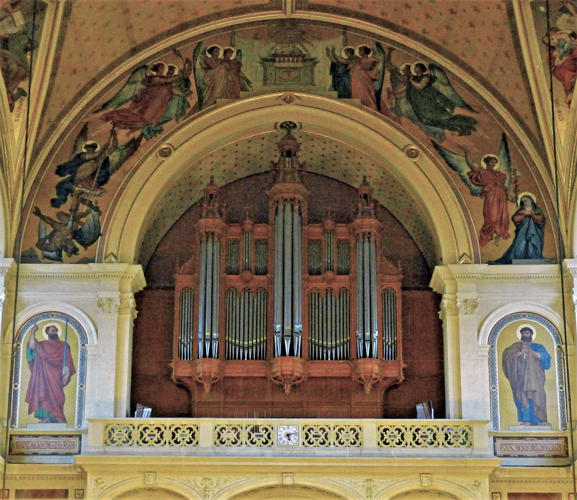 Église de la Sainte-Trinité de Paris (orgue de tribune) - Paris IX